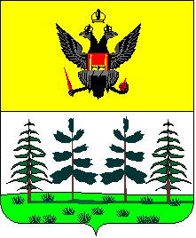 Герб Літина 1796 року